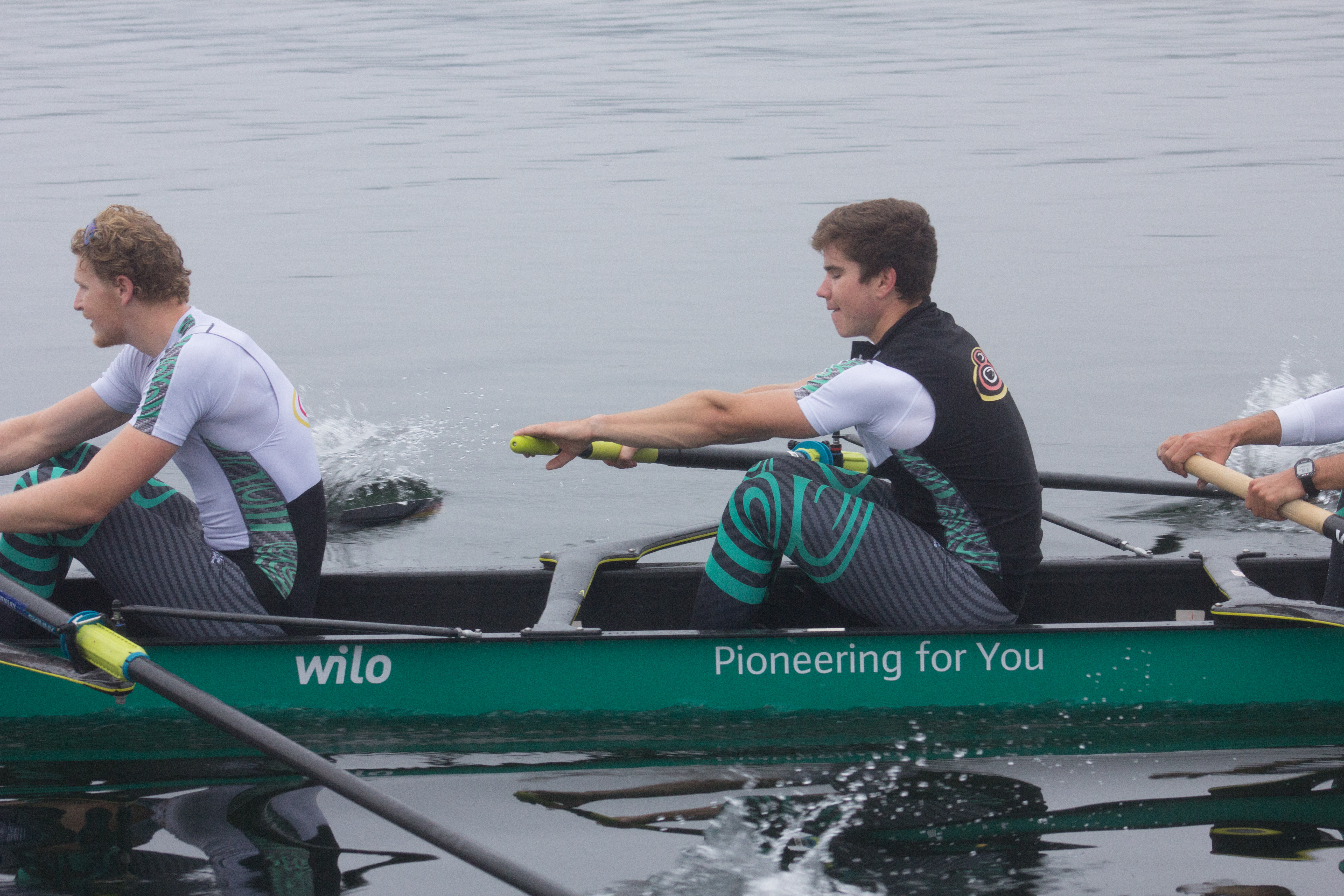 Medientag des Ruderverbandes in der Ruderakademie Ratzeburg am 6. September 2017: Deutschland-Achter im Training auf dem Ratzeburger See in der Besetzung: Johannes Weißenfeld, Felix Wimberger, Maximilian Planer, Torben Johannesen, Jakob Schneider, Malte Jakschik, Richard Schmidt, Hannes Ocik, Martin Sauer